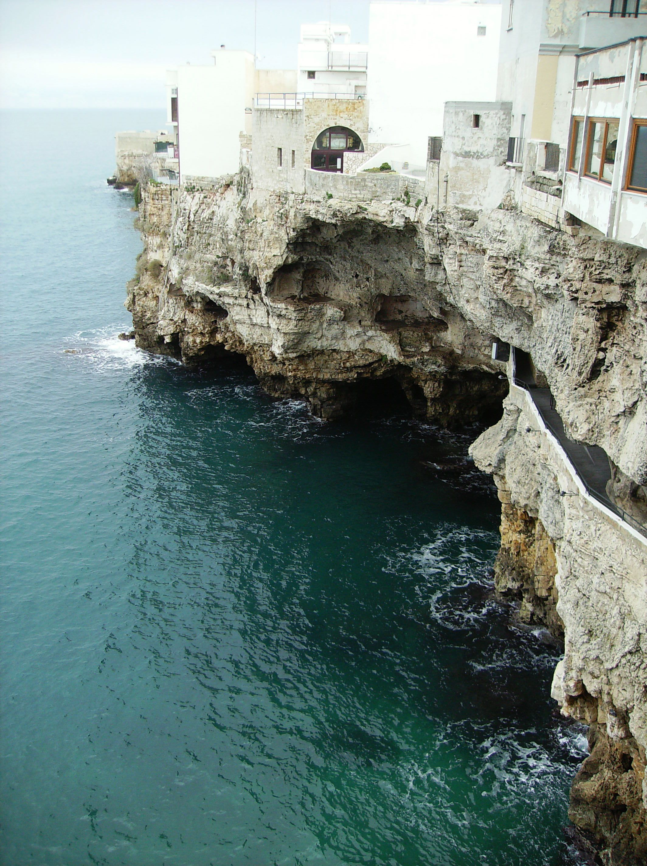 Polignano a Mare - Italie - Extérieur de la grotta palazzese